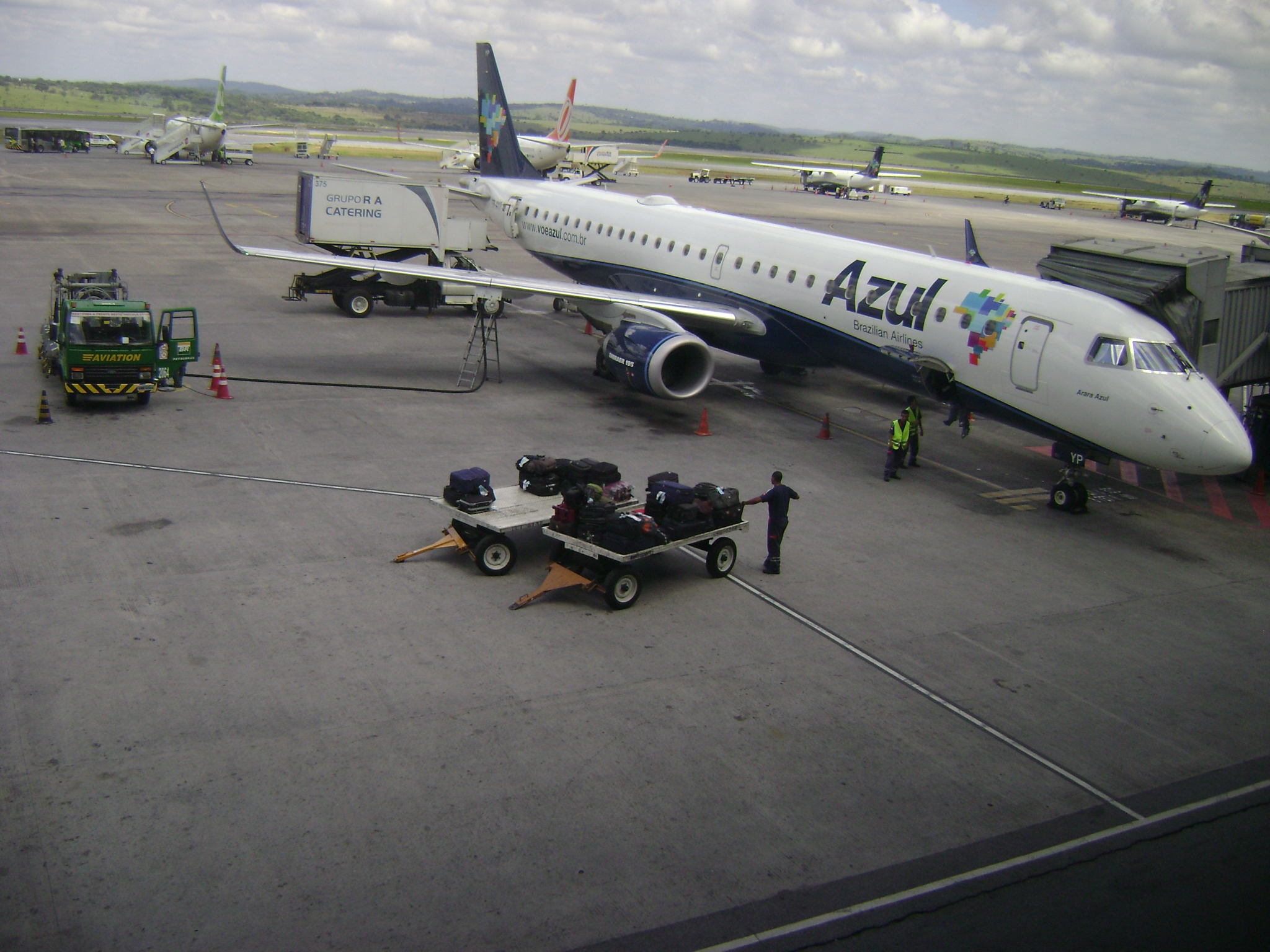 Avião da Azul, no Aeroporto Internacional de Belo Horizonte-Confins, em Minas Gerais, Brasil.